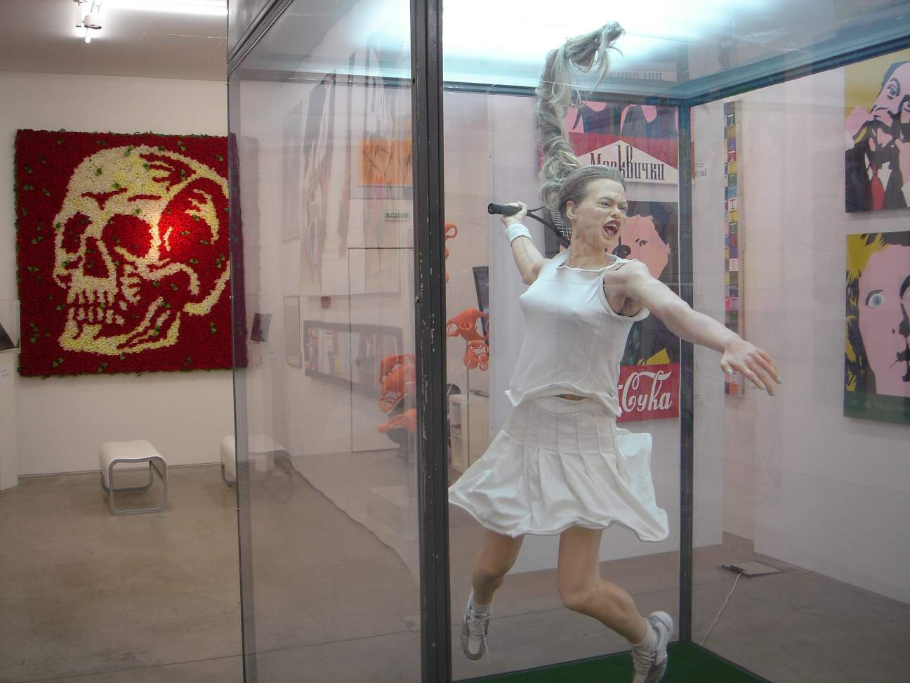 фото экспозиция Музея актуального искусства Art4.ru (Москва)